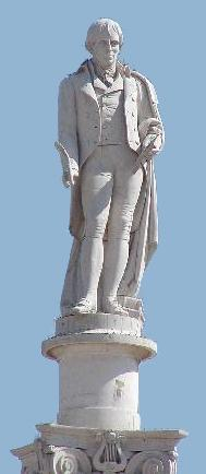 Estatua de Manuel María Barbosa du Bocage en su ciudad natal, Setúbal